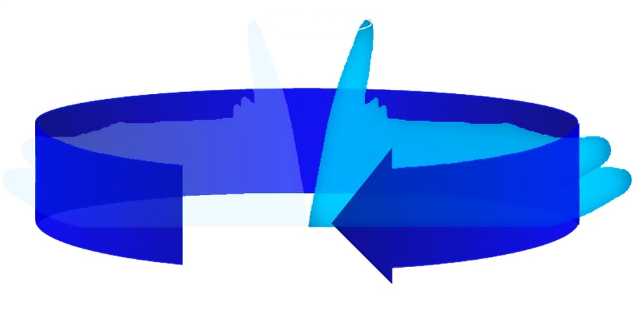 Diagramm eines typischen 2D-Radargerätes, ein rotierendes Cosecans²- Diagramm etwa 2004